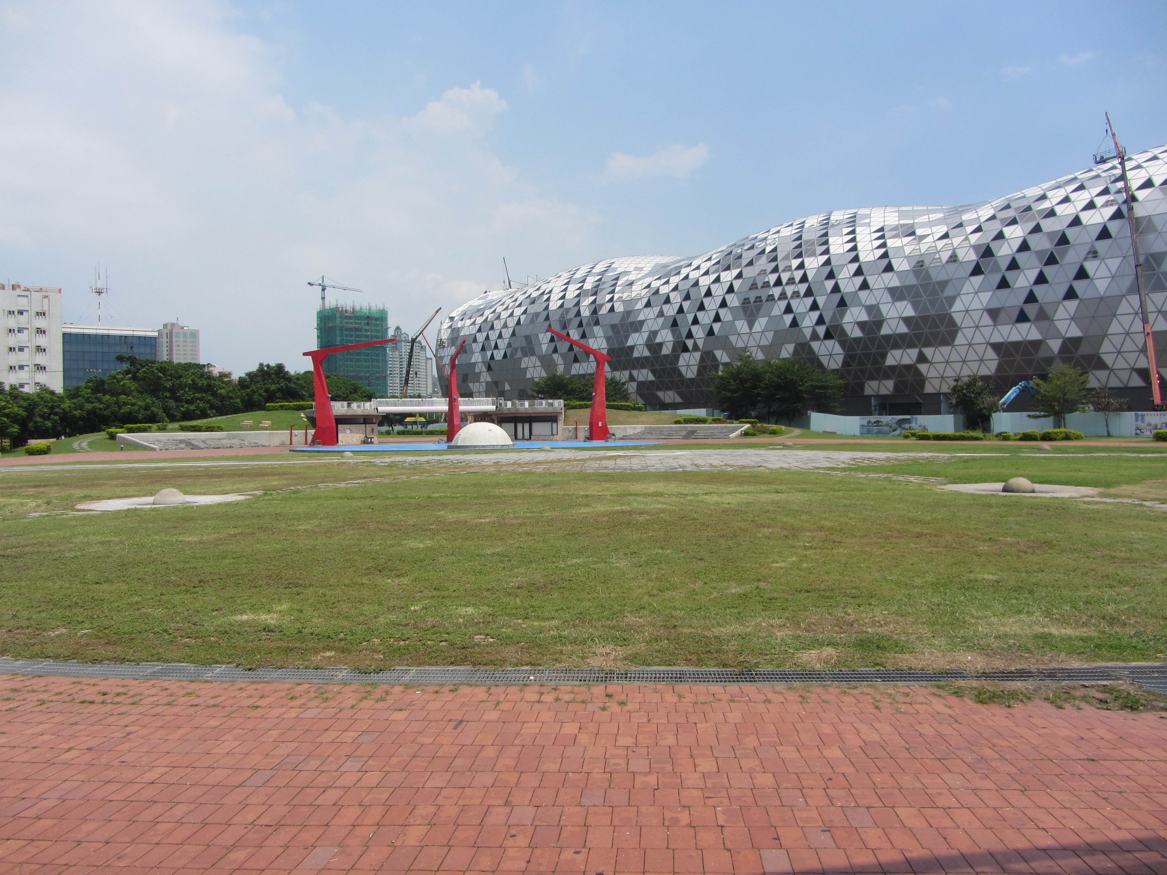 新光碼頭內的廣場